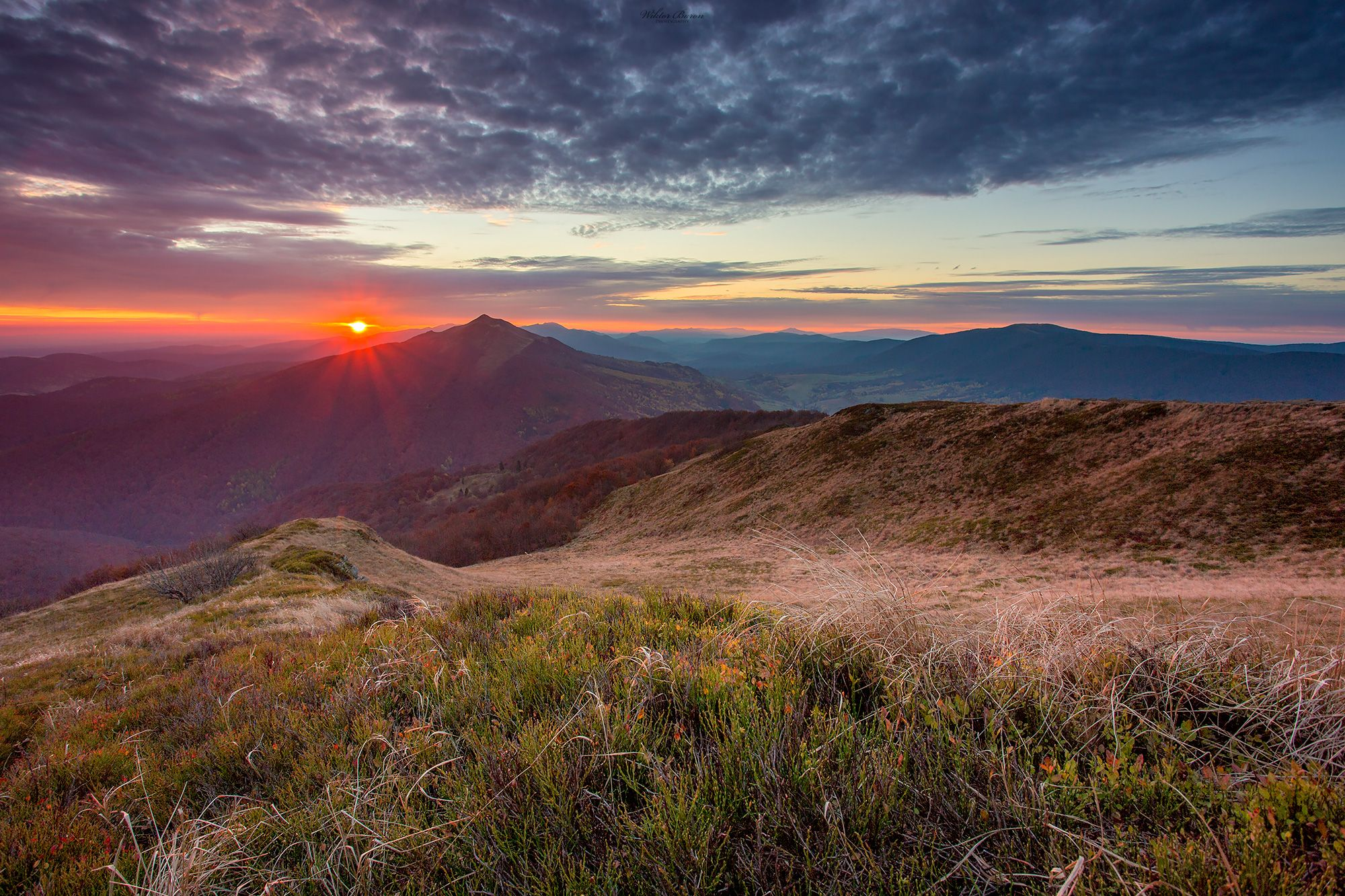 Park narodowy: Bieszczadzki Park Narodowy This is a photography of protected area with CRFOP ID PL.ZIPOP.1393.PN.7